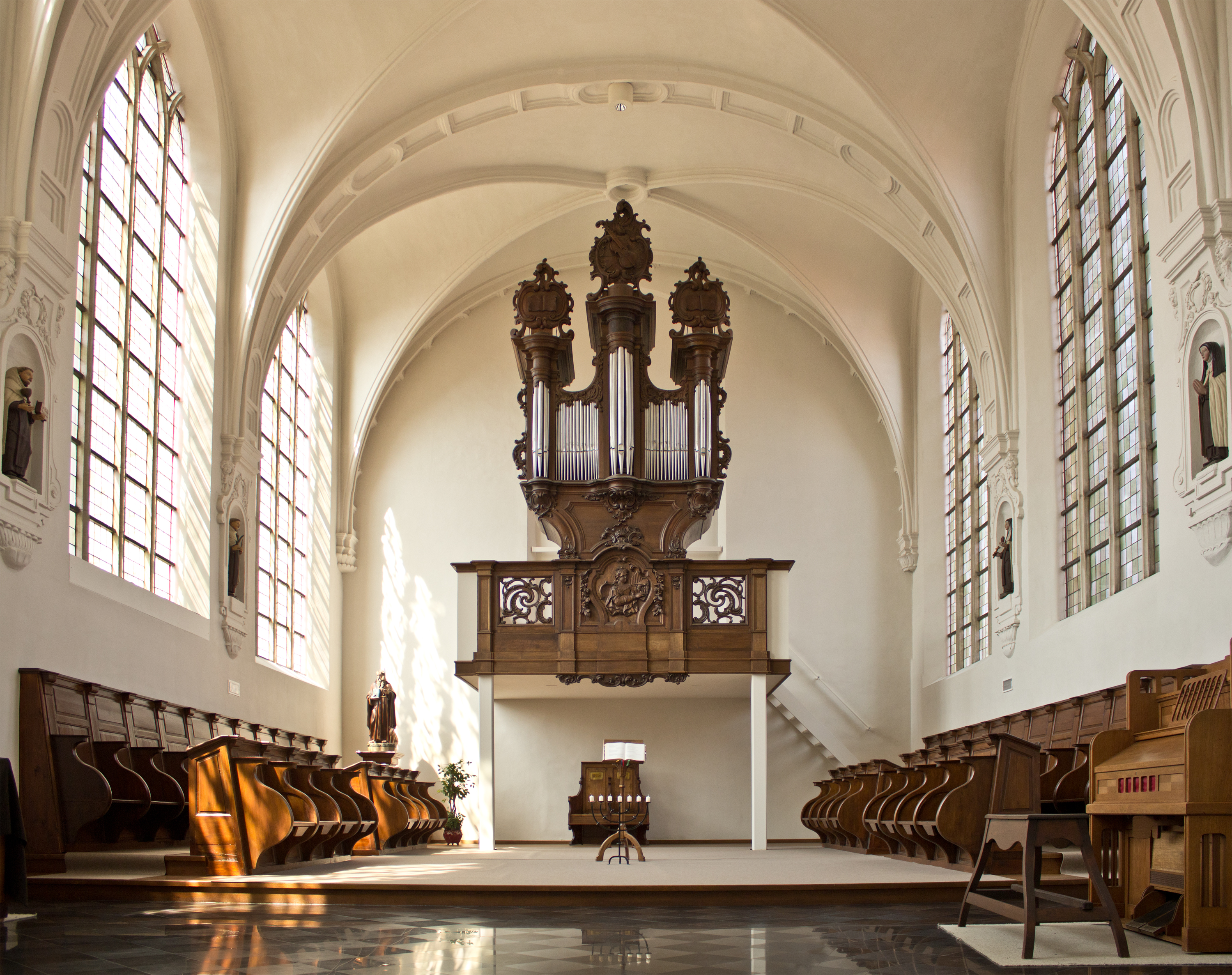 Karmelietessenklooster Onze-Lieve-Vrouw ten Troost, Vilvoorde.